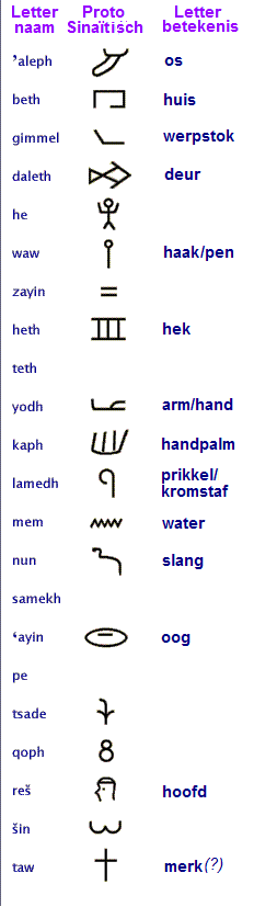 Proto-Sinaïtische lettertekens